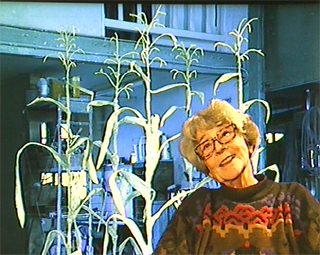 Portrait de Martine Boileau